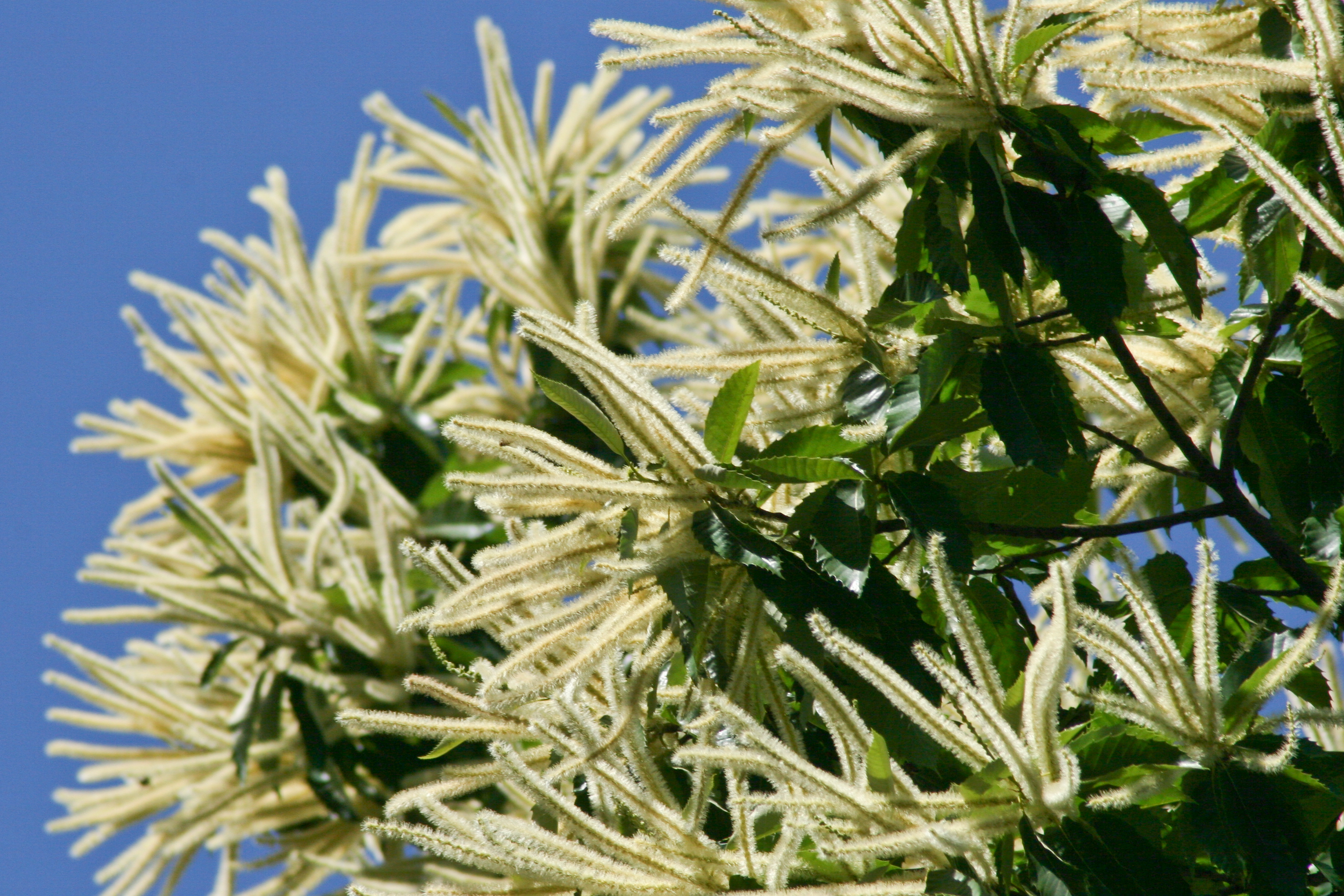 Blüte der Edelkastanie, Castanea sativa, European Chestnut blossom